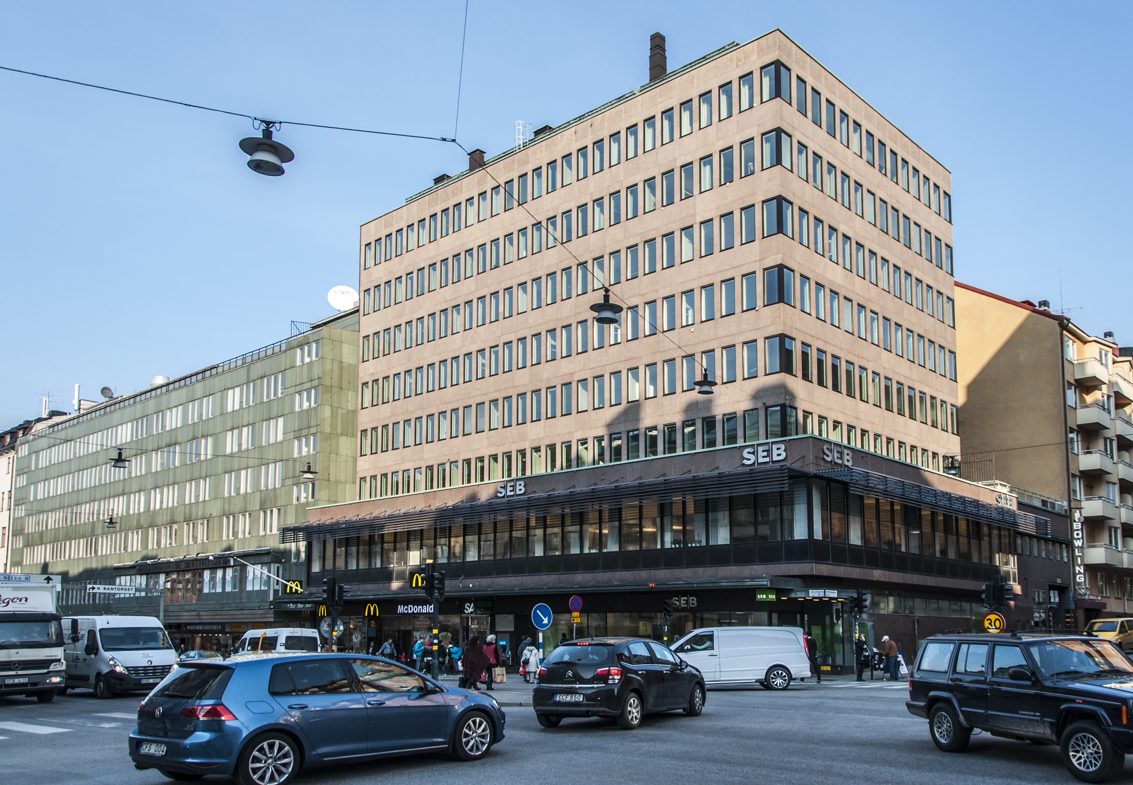 t.v: Grinden 21, Sankt Eriksgatan 34-38, Nybyggnadsår 1958 - 1959, Gösta Edberg (Arkitekt), Turitz & Co (Byggherre), Victor Hanson AB (Byggmästare) t.h Grinden 16, Sankt eriksgatan 32, Sankt göransgatan 66, Nybyggnadsår 1962 - 1971 Diligentia AB (Byggherre), Gösta Edberg (Arkitekt), Hanson Viktor (Byggmästare)